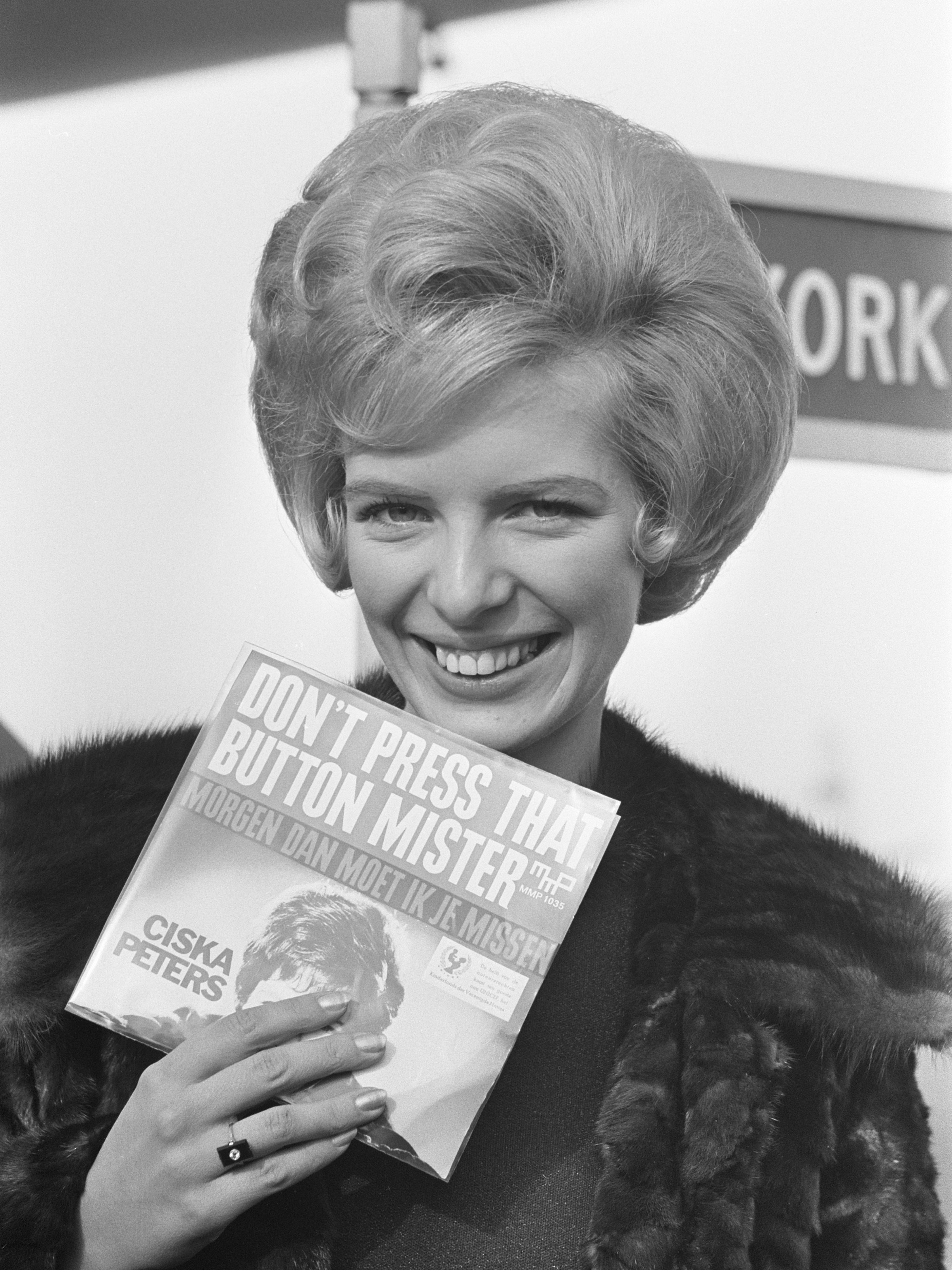 Ciska Peters (zangeres) naar New York vertrokken om plaat aan te bieden aan de UNO 19 oktober 1964